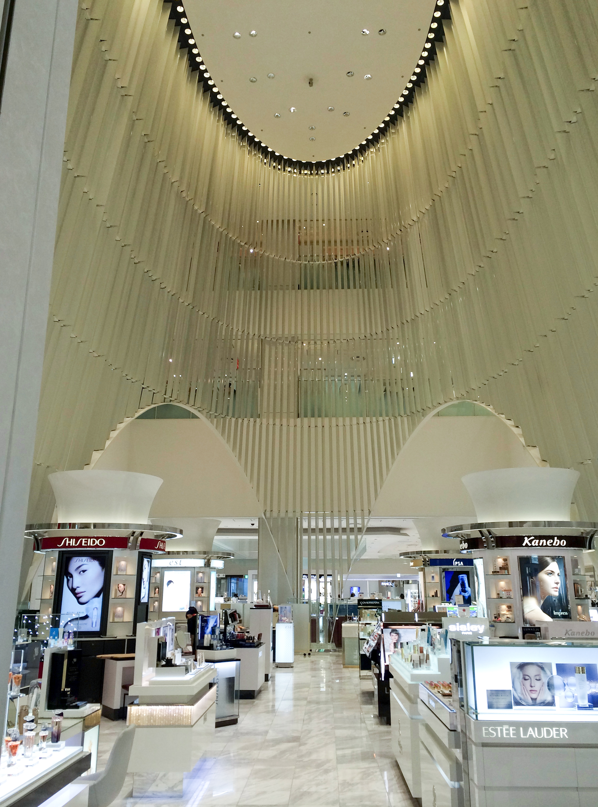 JR Osaka Station ISETAN Void